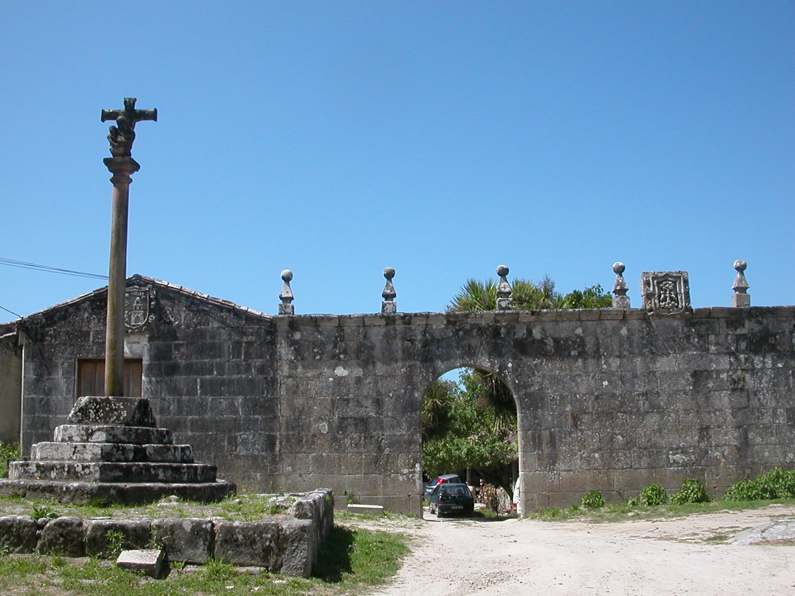 Casa Suero Yañez